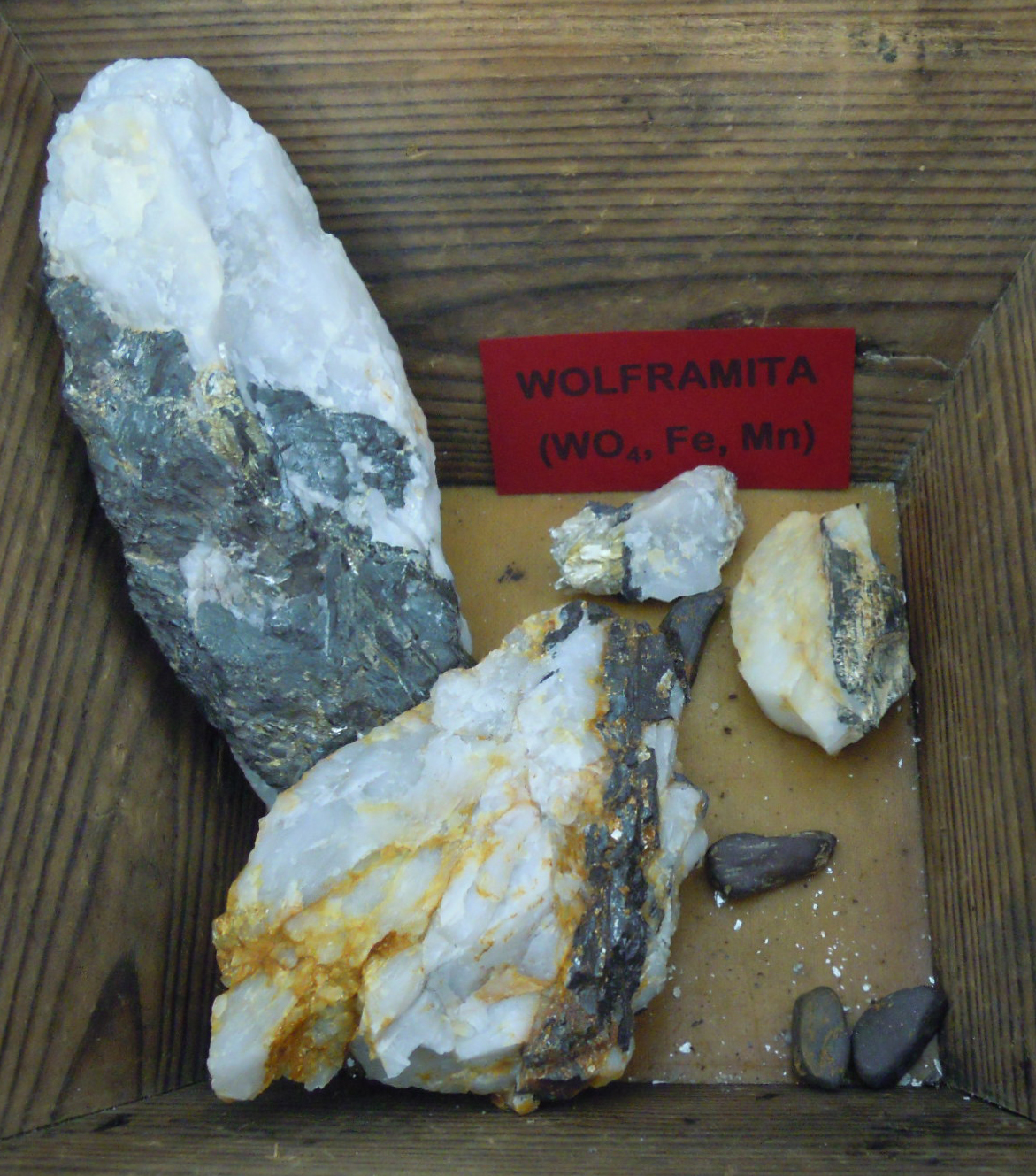 Rochas de volframita (FeMn)WO4 achadas nas minas de San Fins (Lousame).